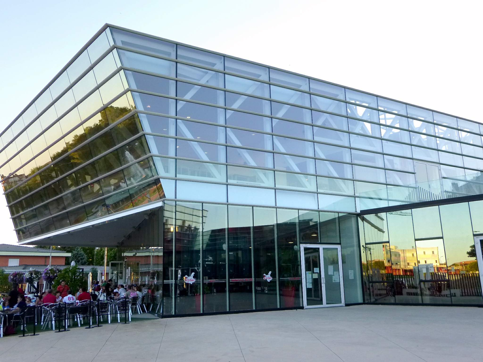 La Caja del Arte (Torrejón de Ardoz)